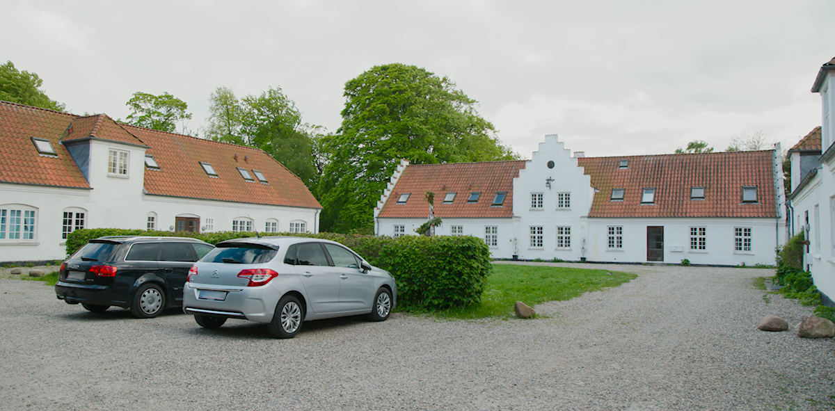 Blangstedgaard I Odense